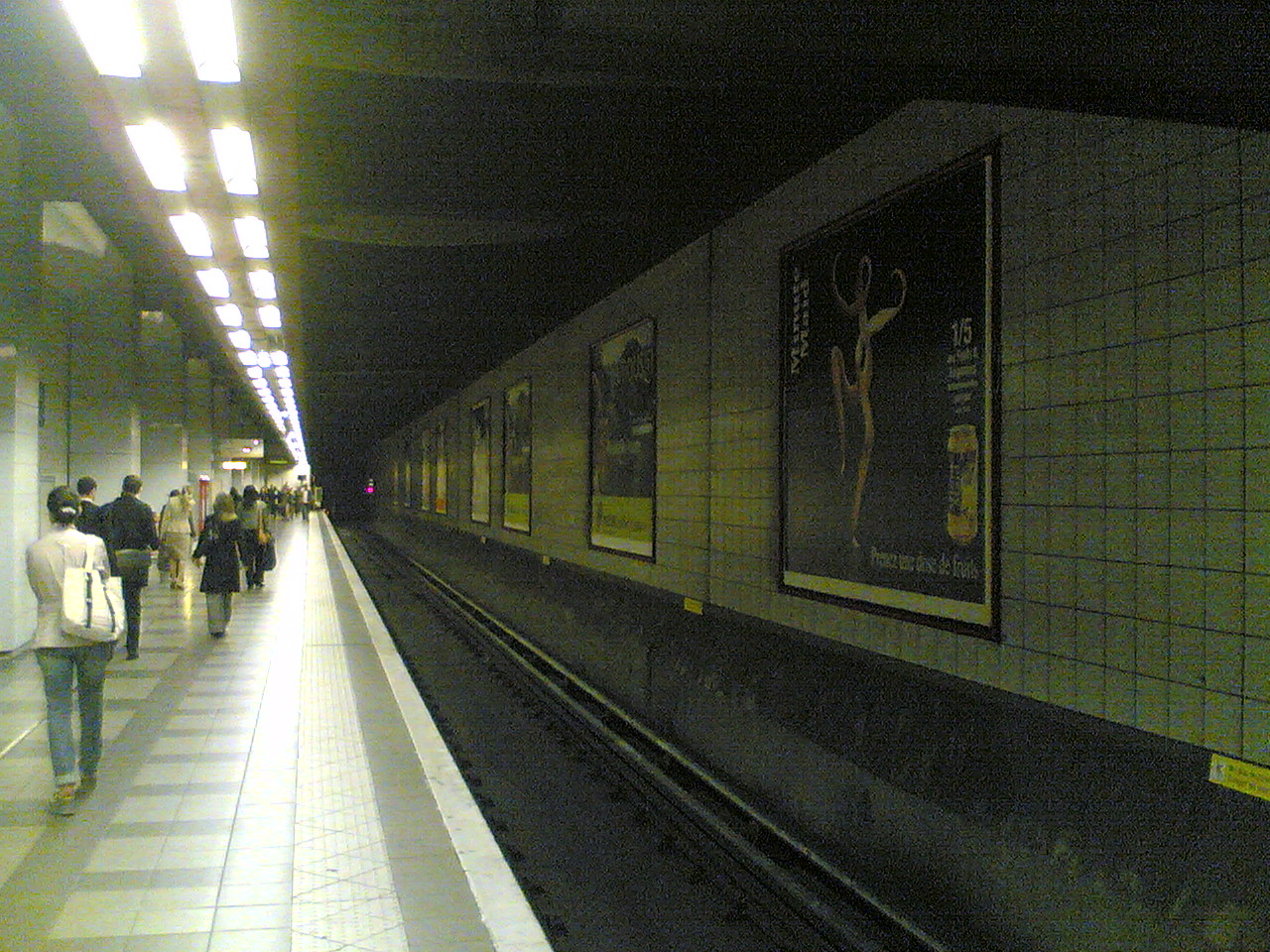 Quai direction Château de Vincennes de la station La Défense - Grande Arche de la ligne 1 du métro de Paris